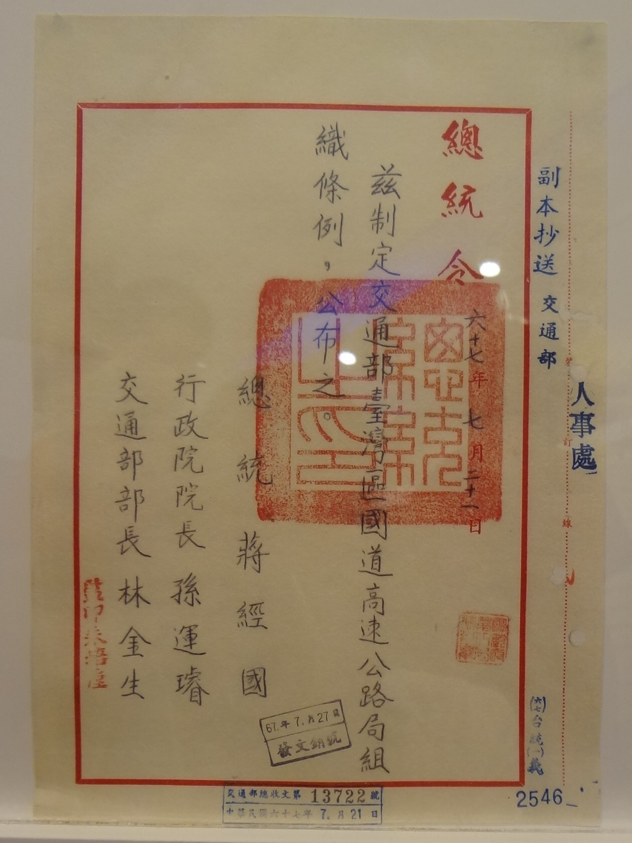 1978年（中華民國67年）7月21日，中華民國總統蔣經國發布總統令，公布《交通部臺灣區國道高速公路局組織條例》。右方蓋印總統之印。